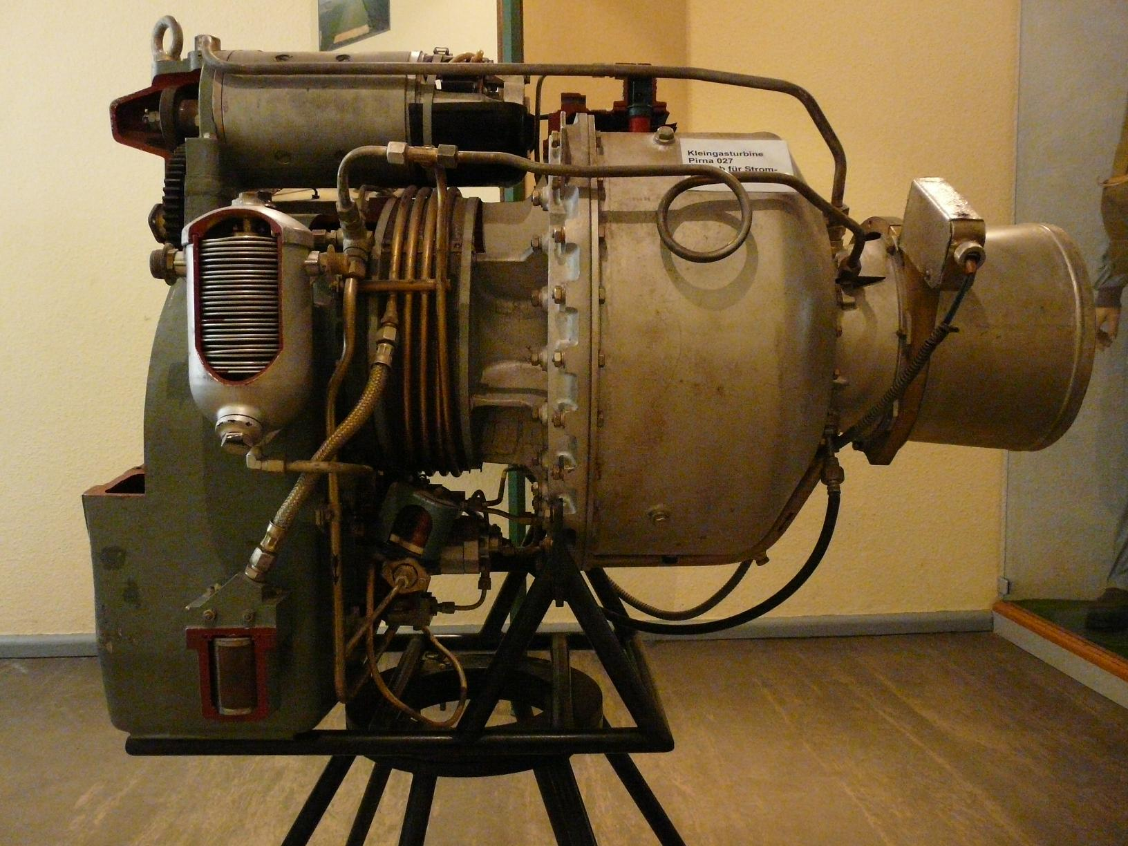 Kleingasturbine Pirna 027 (Antrieb für Stromerzeuger AG-2 und AG-3)